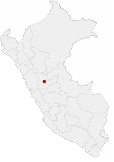 Ubicacion geografica de la Ciudad de Huanuco en el Perú, imagen modificada por Disjockey.